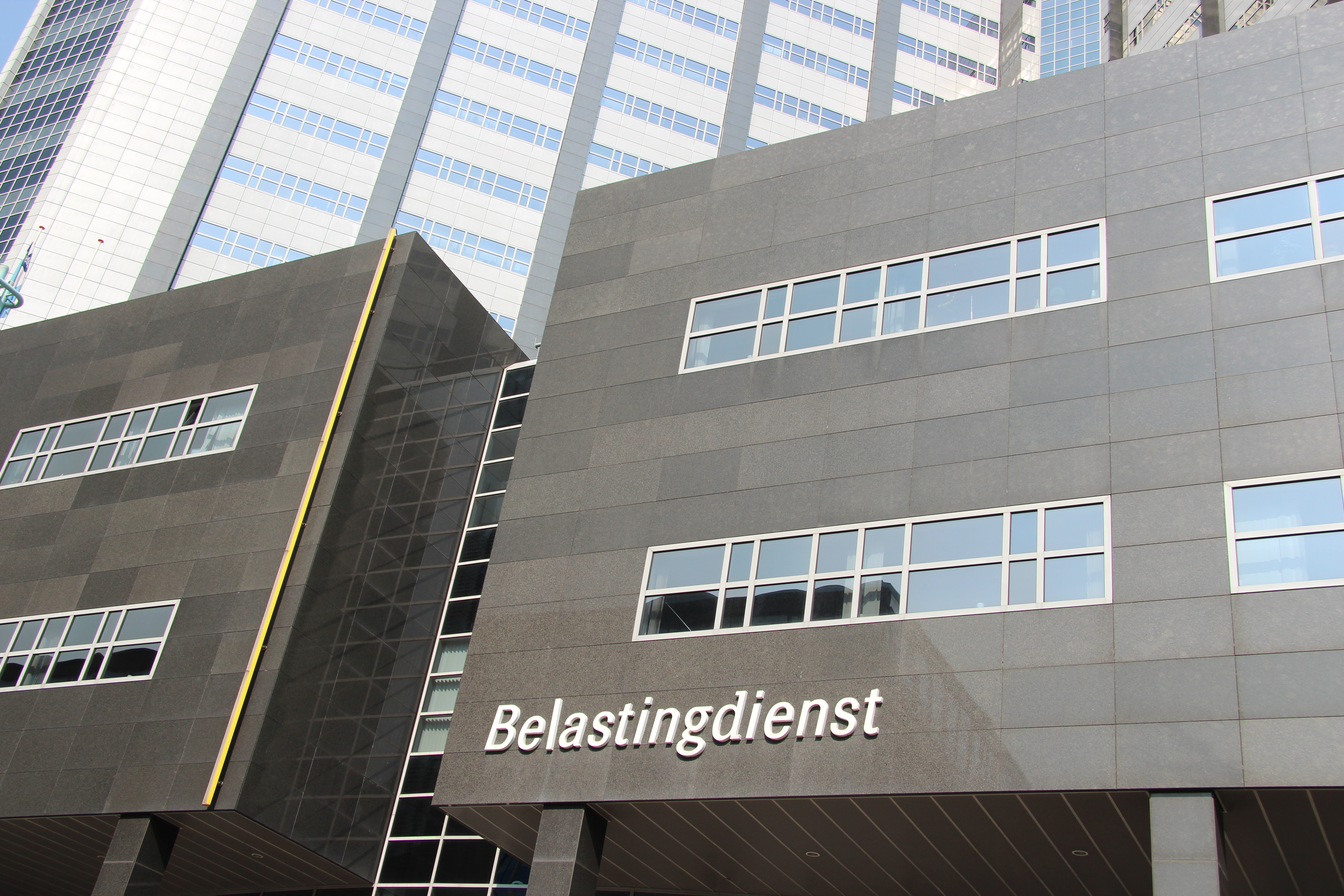 Belastingdienst Amsterdam